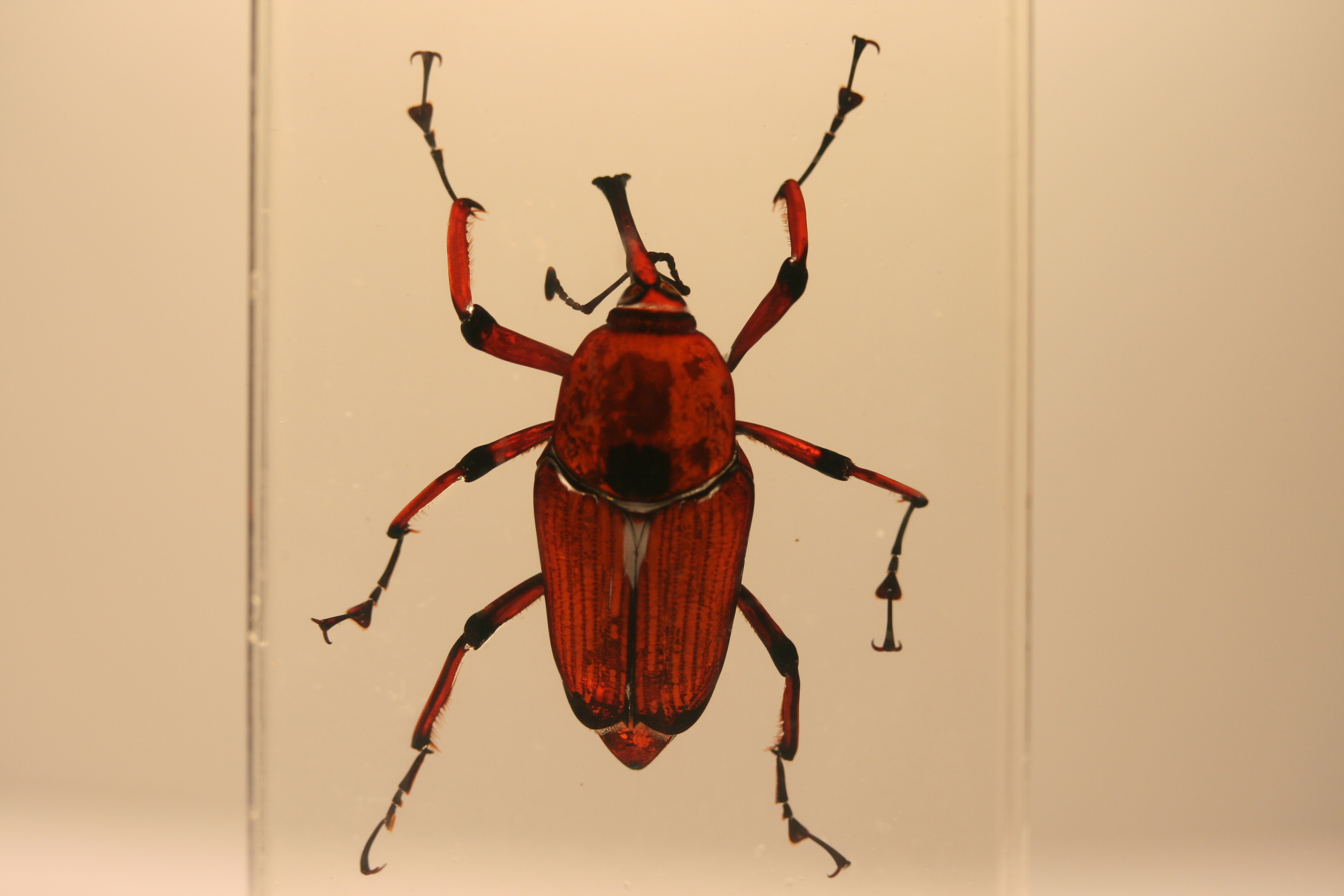 Bambusrüssler